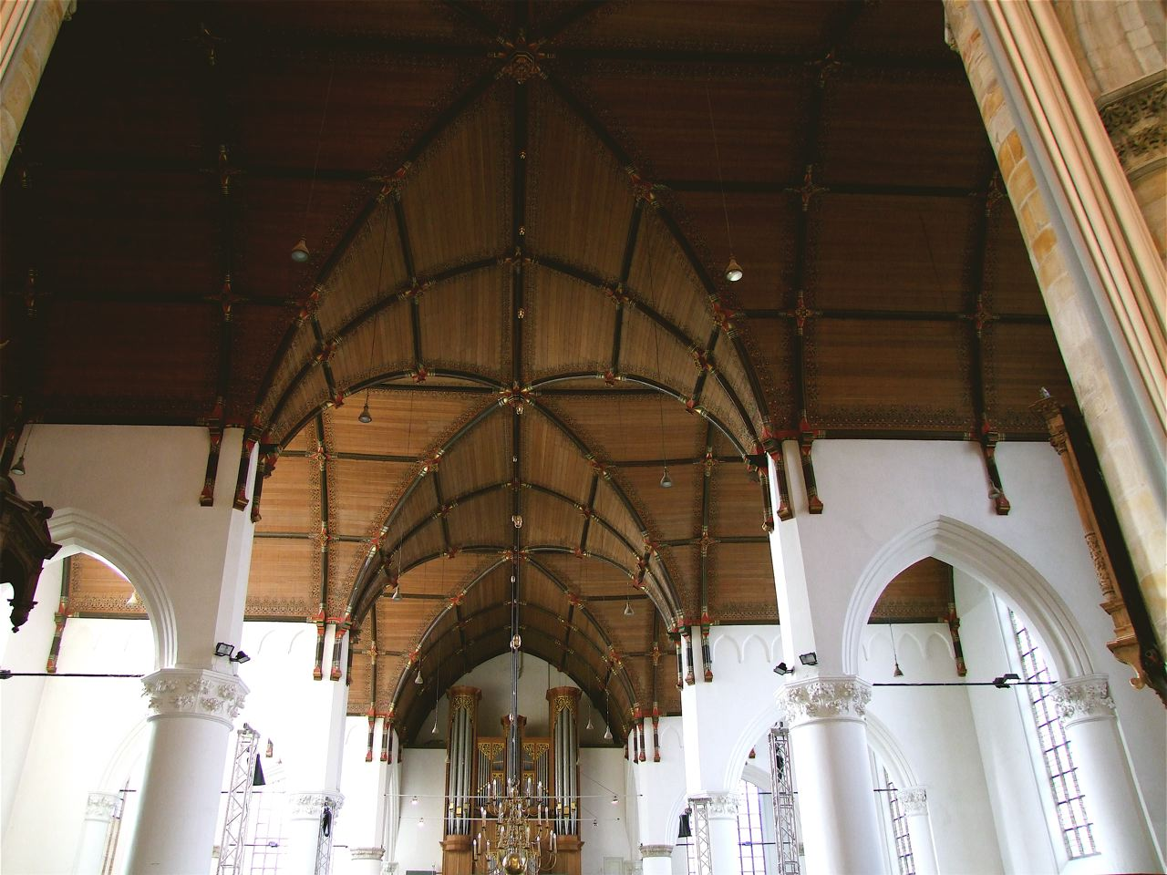 Den Haag De Grote of Sint-Jacobskerk is een kerkgebouw in het centrum van Den Haag. Het behoort met het Binnenhof tot de oudste gebouwen van Den Haag. (middenschip) Vanaf ca. 1420 werd de bestaande toren gebouwd. De zeskantige vorm is uniek in Nederland. Aangenomen wordt dat de achtkantige toren van de abdij in Middelburg, waarmee de St. Jacob indertijd verbonden was, als voorbeeld heeft gediend.De kerk werd oorspronkelijk als kruiskerk gebouwd. Tussen 1434 en 1455 werd het schip echter uitgebreid met zijbeuken, waardoor de kruisvorm verloren ging. Deze vergroting maakte de St. Jacob tot het eerste voorbeeld van het Haagse hallentype, een type hallenkerk dat daarna in met name het graafschap Holland op grotere schaal zou worden ingevoerd. Bij dit type hallenkerk zijn de traveeën van de zijbeuken elk voorzien van een hoge topgevel met een eigen kap die dwars staat op het dak van de middenbeuk. Deze constructie maakte het mogelijk de zijbeuken van grote vensters te voorzien.